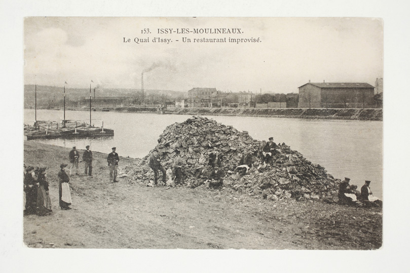 Issy-les-Moulineaux - Le Quai d'Issy - Un restaurant improvisé Adresse actuelle : 43 quai du Président Roosevelt